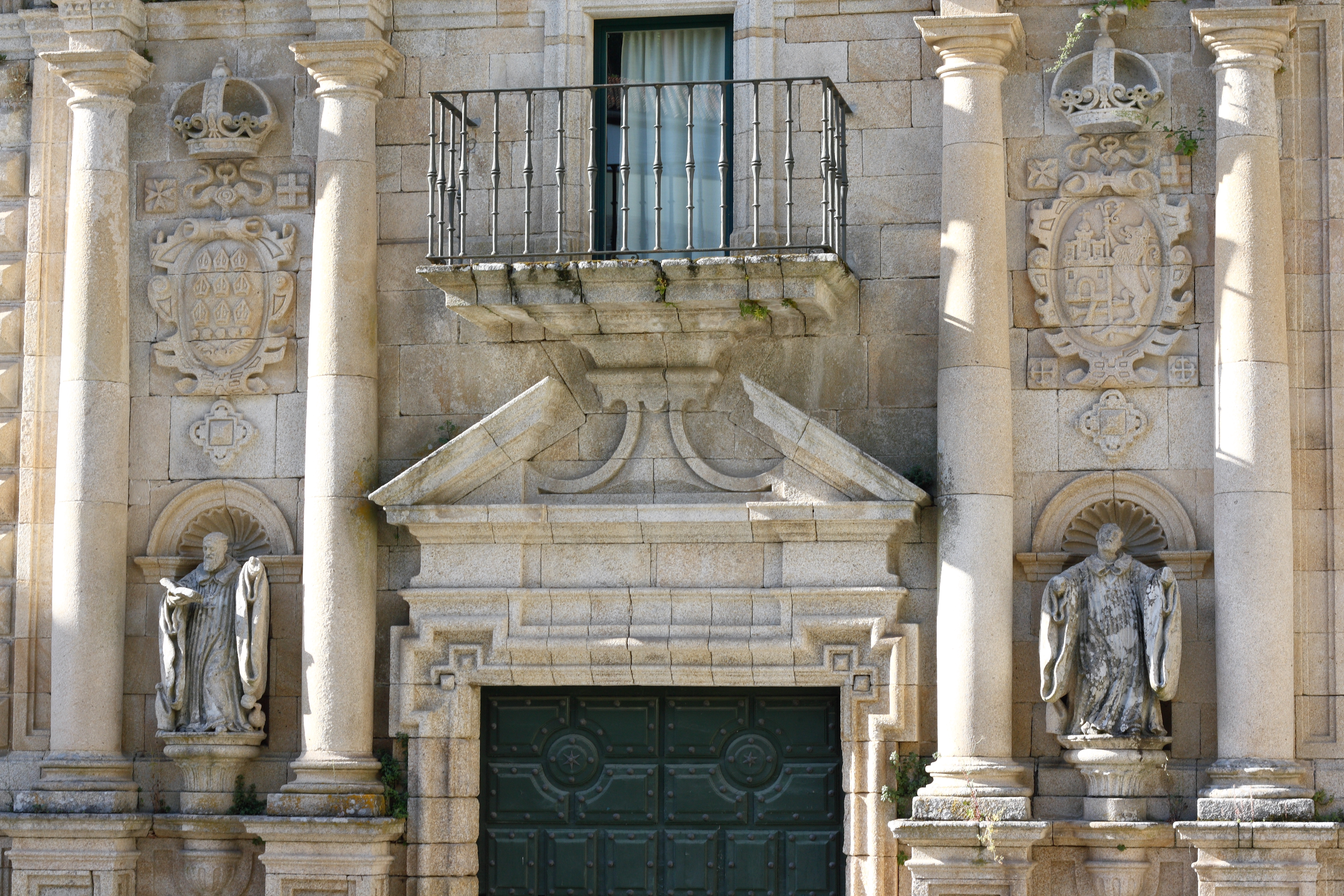 Ehemaliges Kloster Santo Estevo de Ribas de Sil (Nogueira de Ramuín) in der spanischen Provinz Ourense (Galicien), Eingangsfassade mit Wappen; links Wappen des Klosters mit neun Bischofsmützen